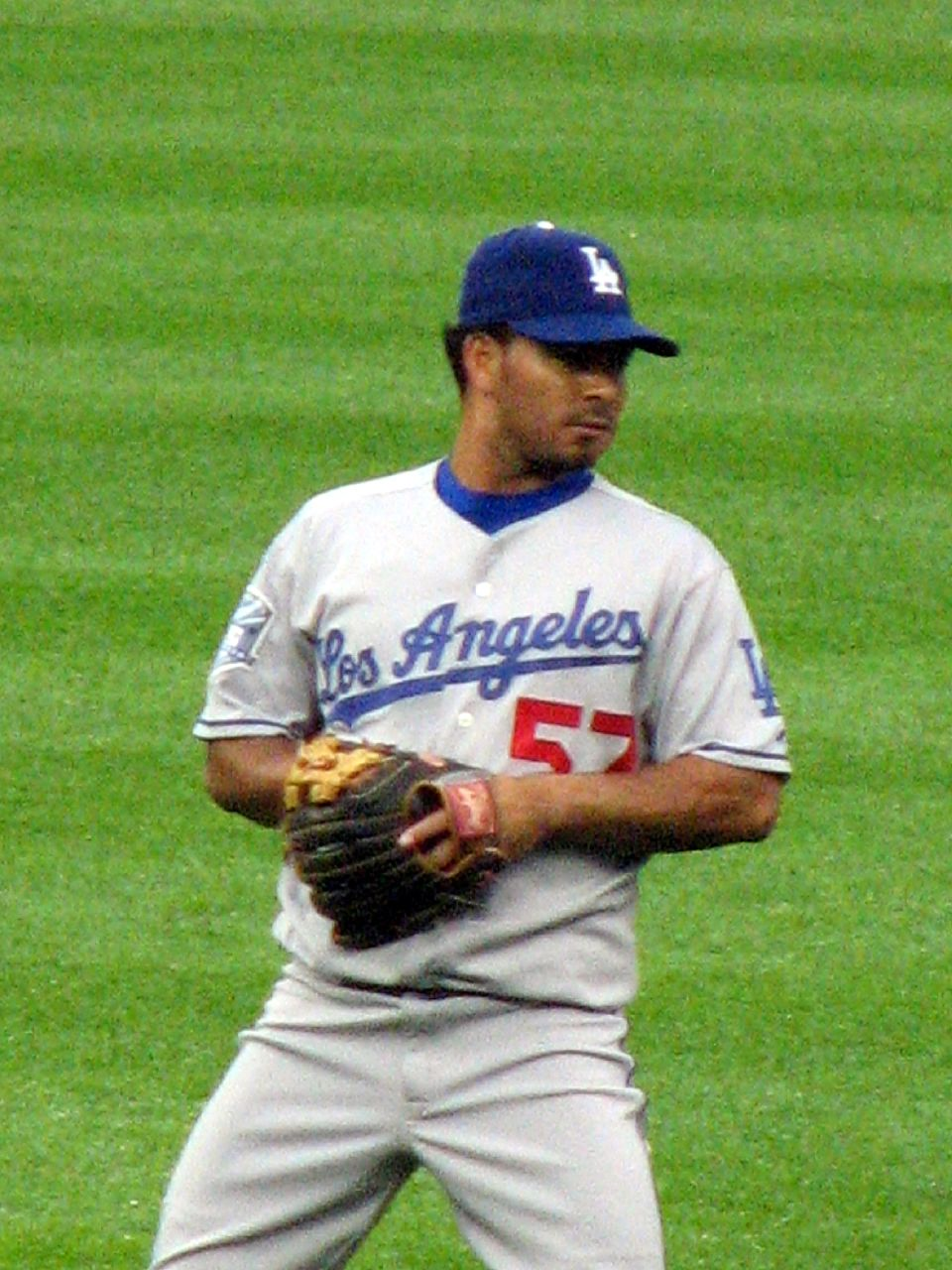 Luis Maza